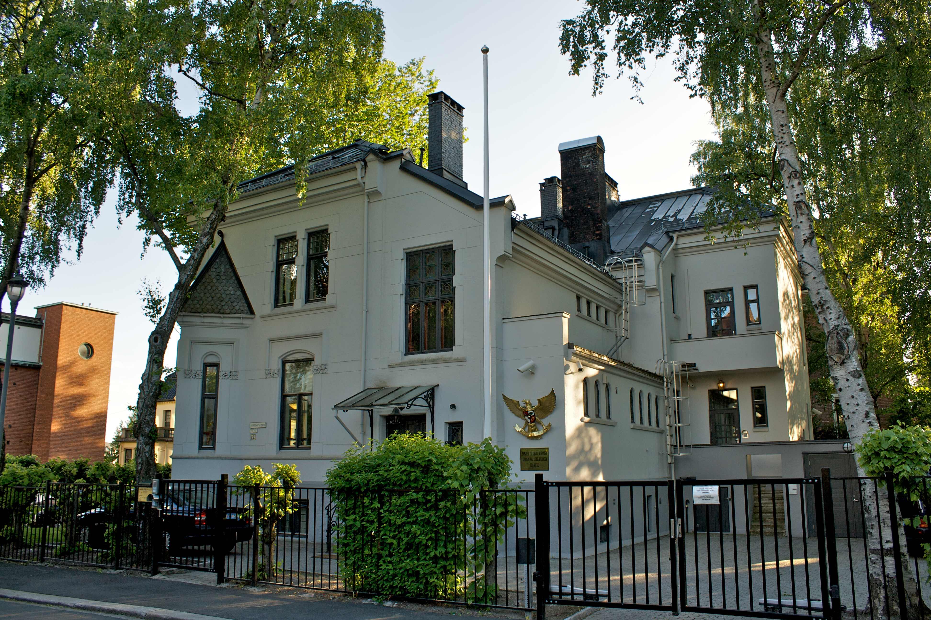 Indonesias ambassade i Fritzners gate 12 på Gimle i Oslo.